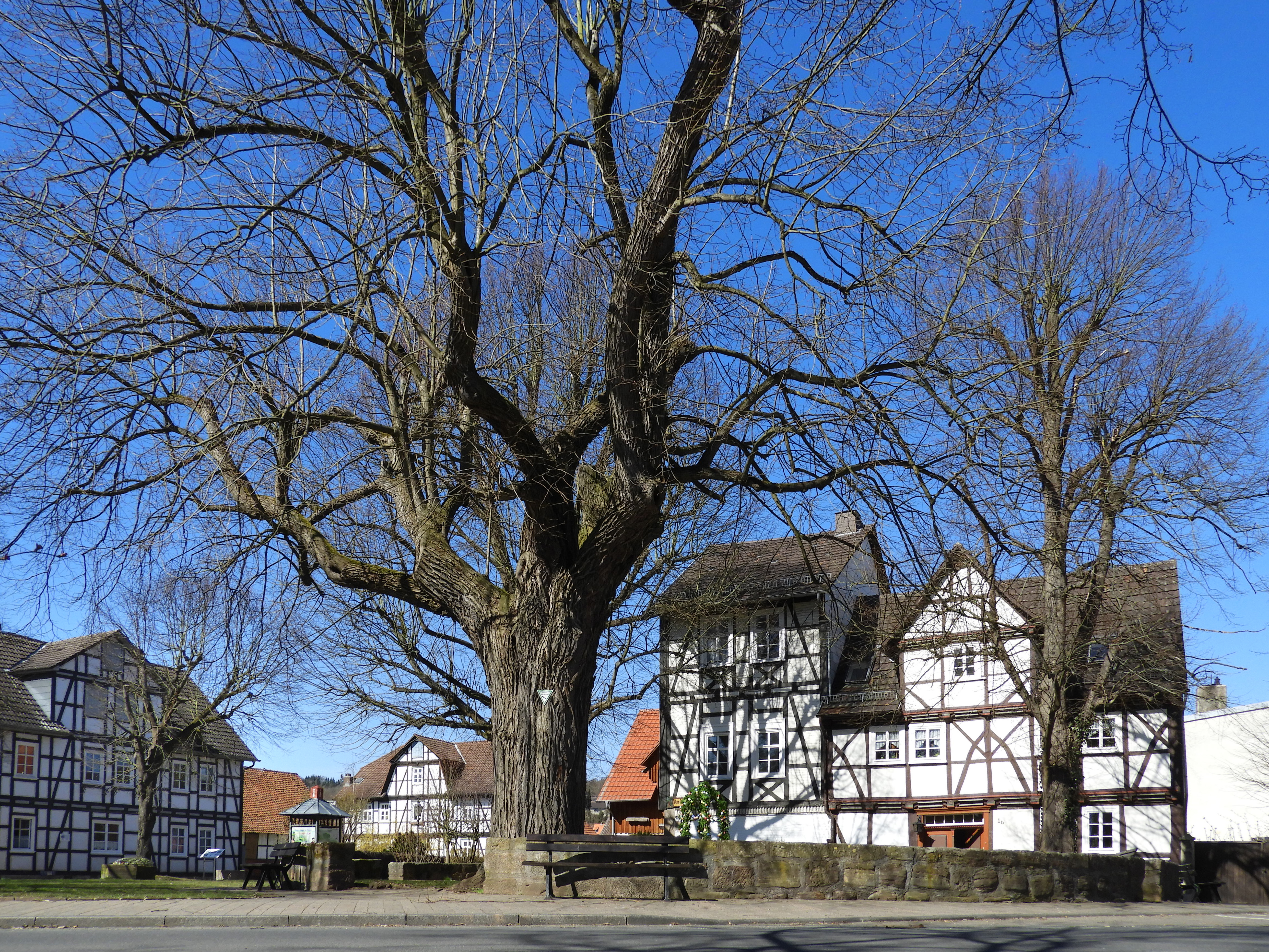 Die alte Linde auf dem Anger im ehemaligen Dorfkern Grebendorfs ist die letzte von fünf um 1750 gepflanzten Bäumen. In 1936 wurde sie als Naturdenkmal ausgewiesen. Als alte Versammlungs- und Gerichtsstätte ist die gesamte Anlage aus ortsgeschichtlichen Gründen schützenswertes Kulturdenkmal.